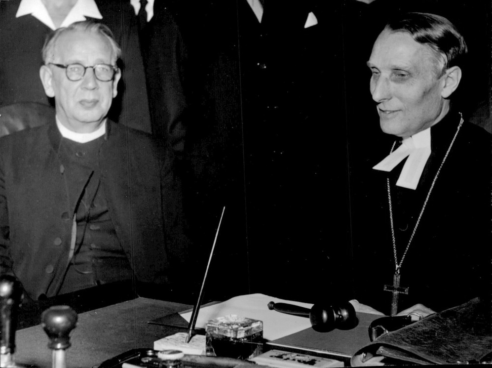 Biskopsvisitation i Jacobs. Pastor primarius Olle Nystedt och biskop Manfred Björkquist.best. red. Oliv.